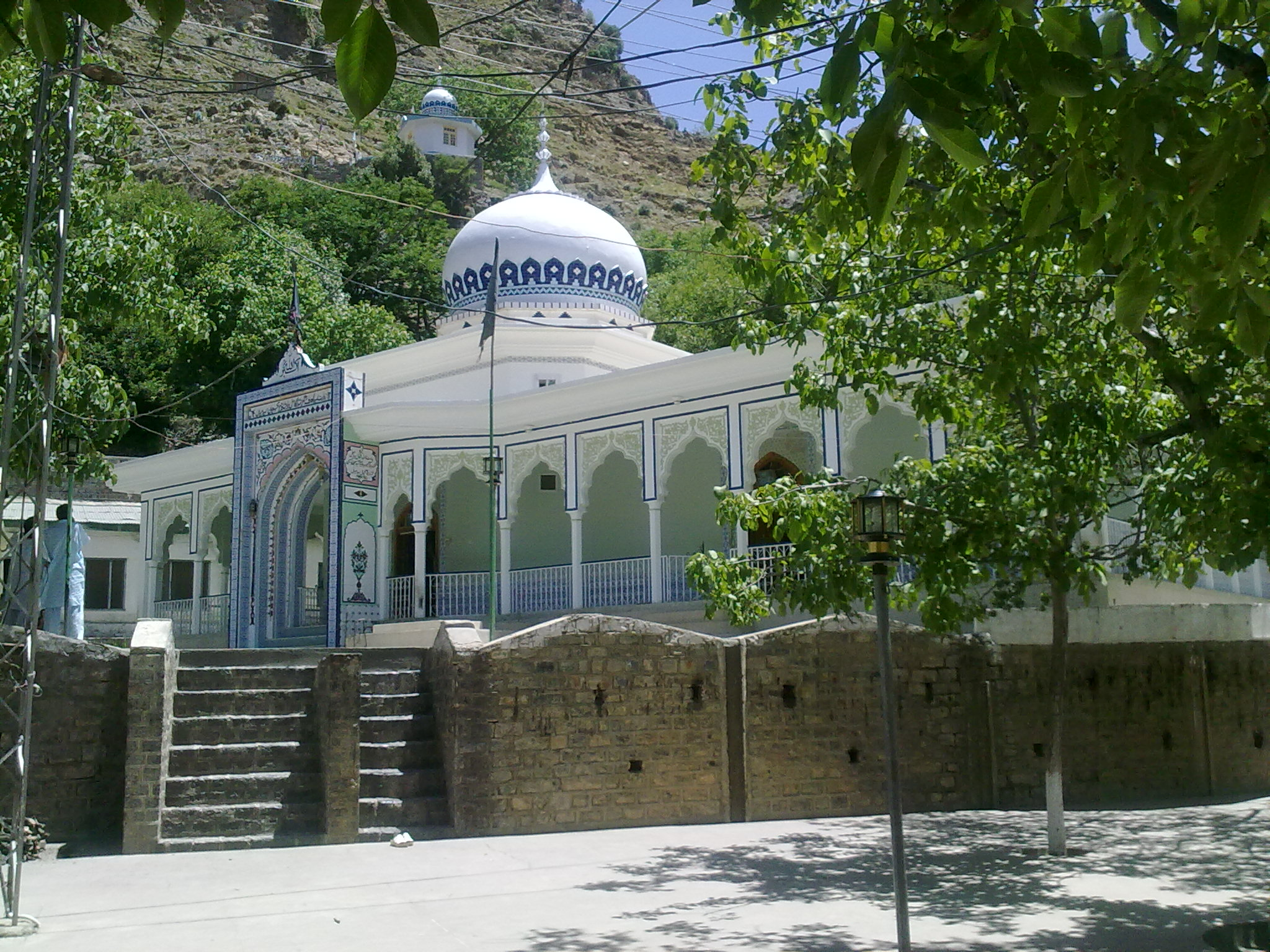 BADSHAH MIR AKBAR JAN SYED BADSHAH ZIARAT